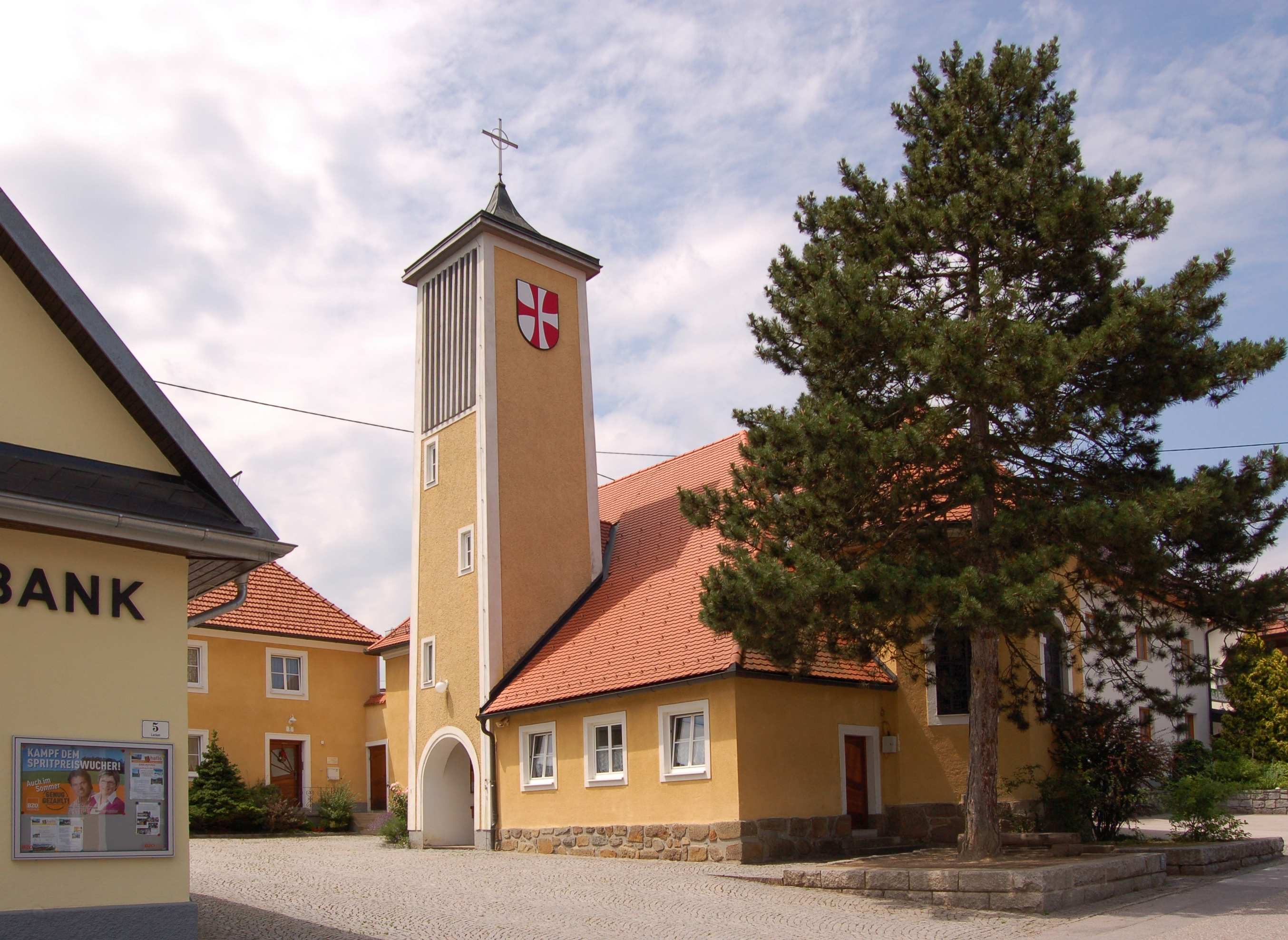 Die Kirche Maria-Hilf wurde zwischen 1930 und 1933 errichtet und zwischen 1952 und 1953 erweitert. Der Glockenturm wurde 1961 angebaut.